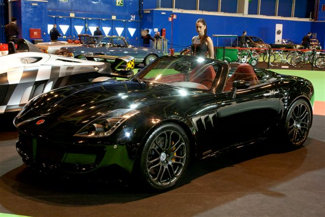 Coche deportivo, Tauro Sport Auto V8 Spider, durante la Feria TRAMO en IFEMA, Madrid (España)